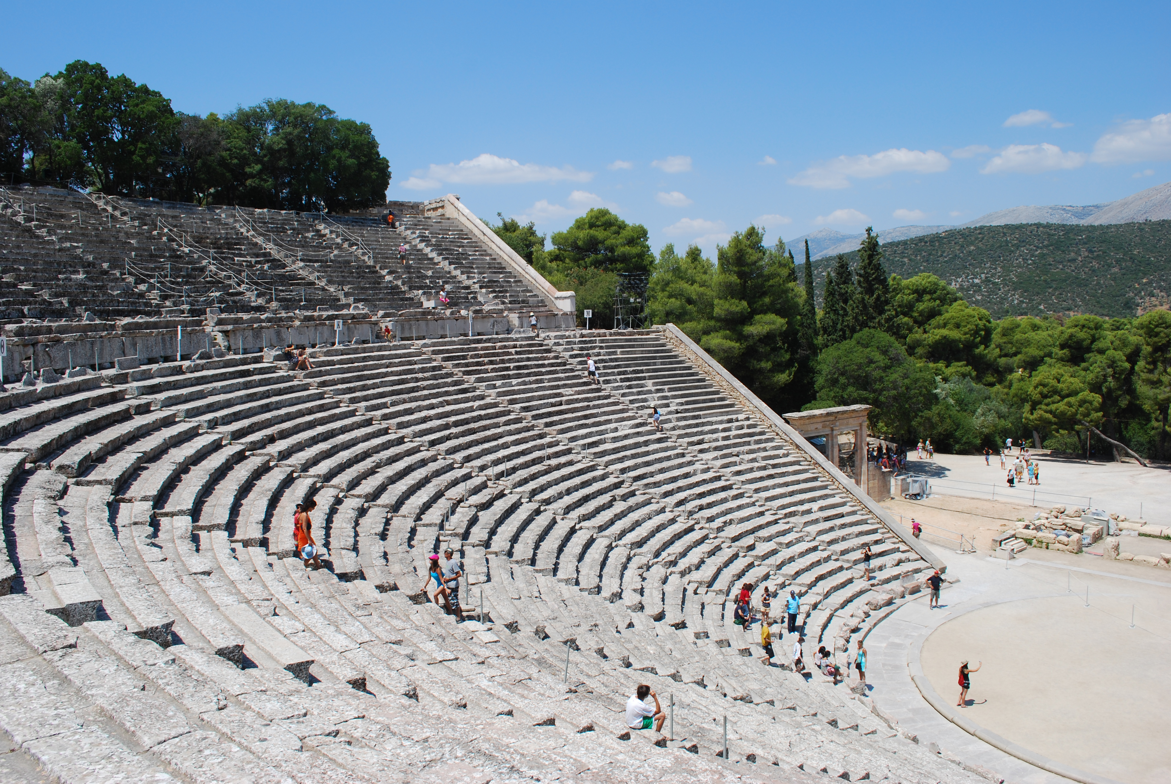 Vue du théâtre d'Epidaure.